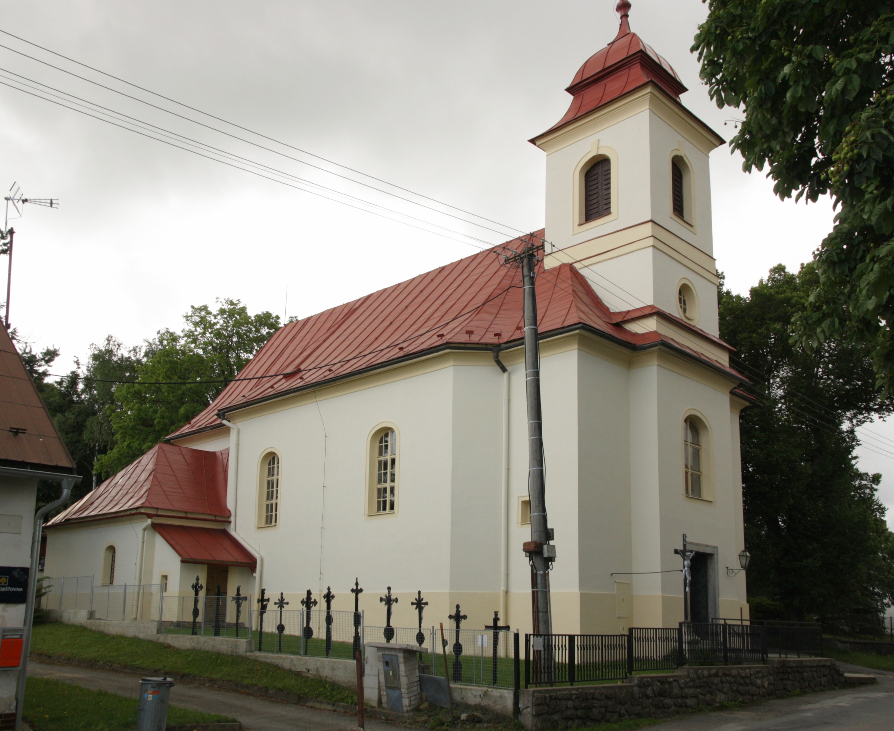 Fryšava pod Žákovou horou - kostel svatého Matouše, pohled od severu